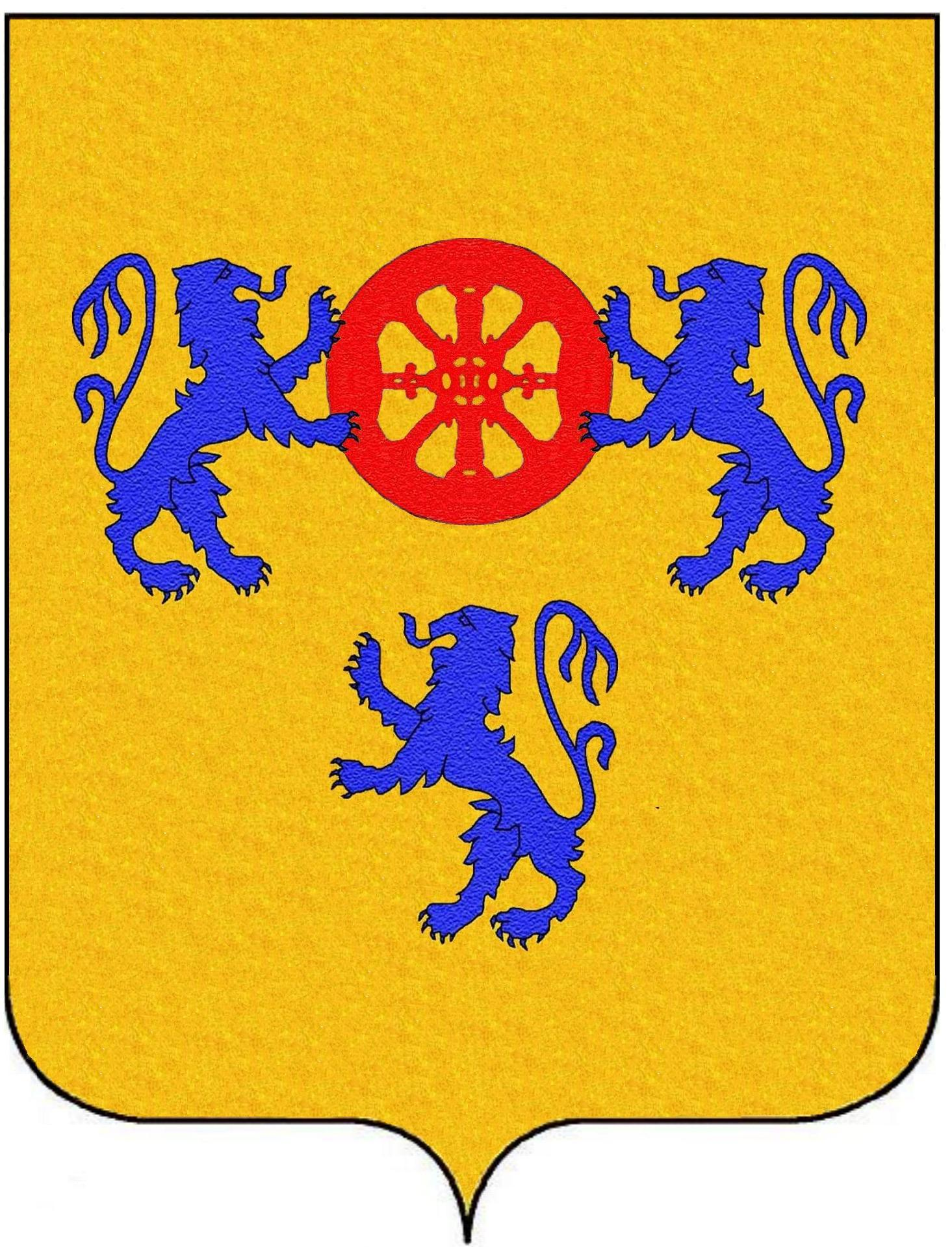 Arme gentilizia della Famiglia Ugurgieri della Berardenga 2